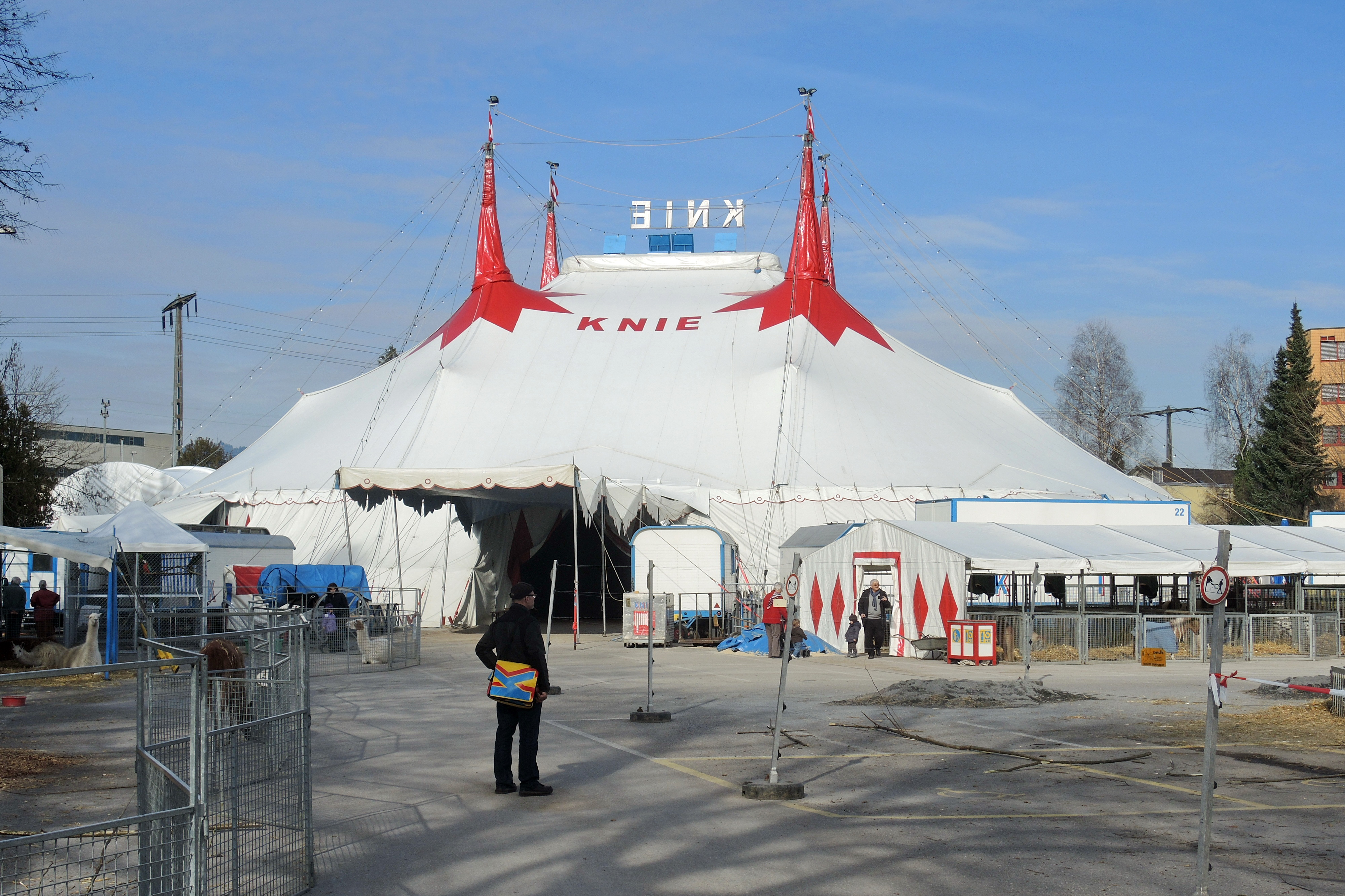 Circus Knie in Rapperswil (Switzerland)